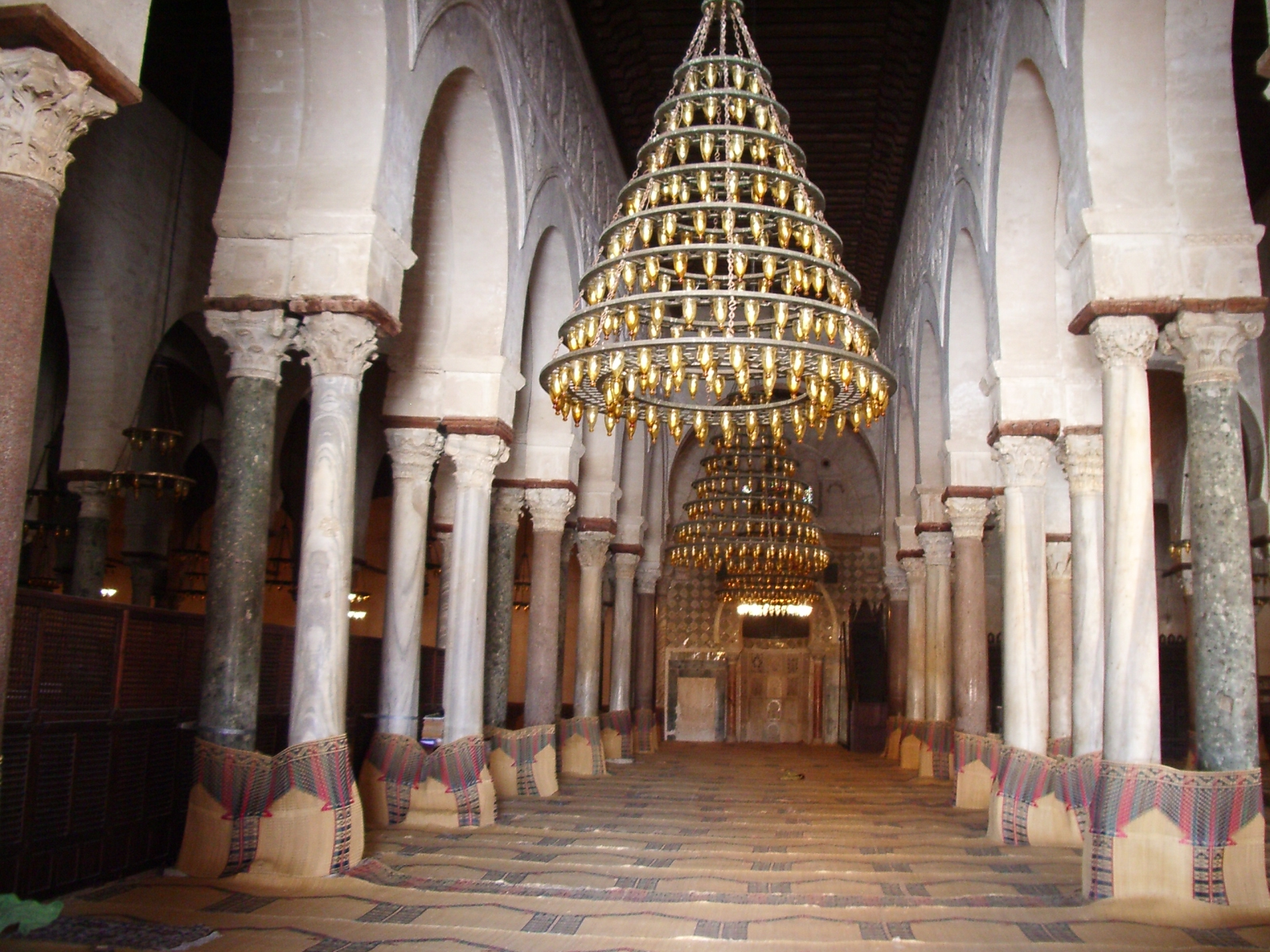 Gran mesquita de Kairuan